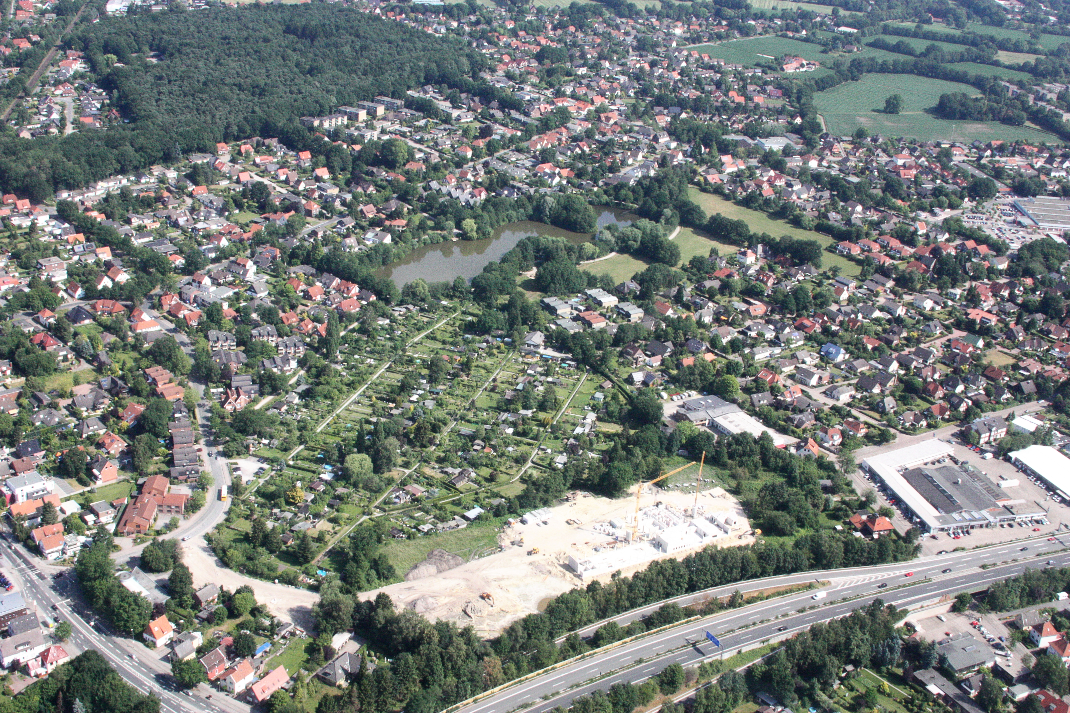 Luftaufnahmen Oldenburg (Oldenburg), mit Weiterflug nach Westen; 1500 Fuß Flughöhe; Juli 2010; Originalfoto bearbeitet: Tonwertkorrektur und Bild geschärft mit Hochpassfilter